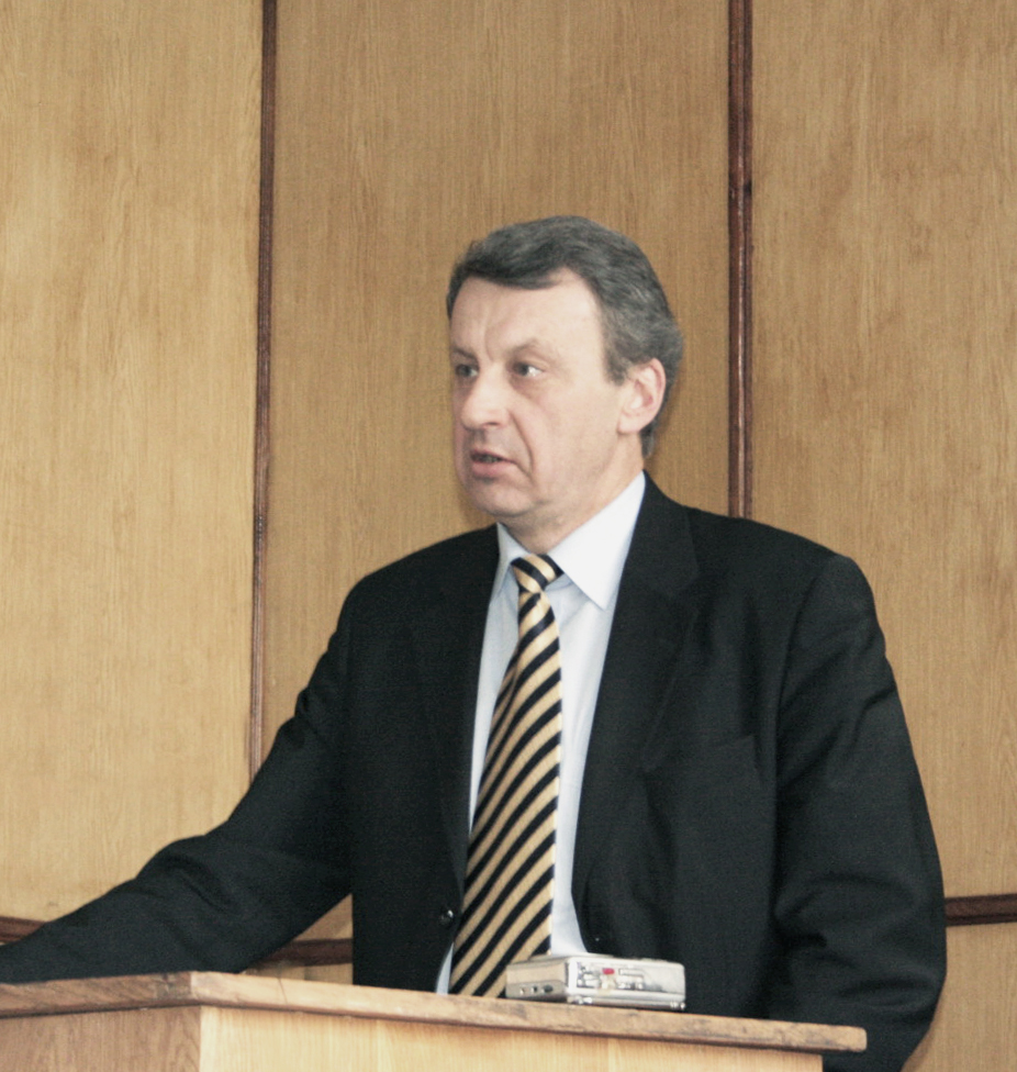 Ємельянов Ігор Георгійович: виступ на засіданні спецради